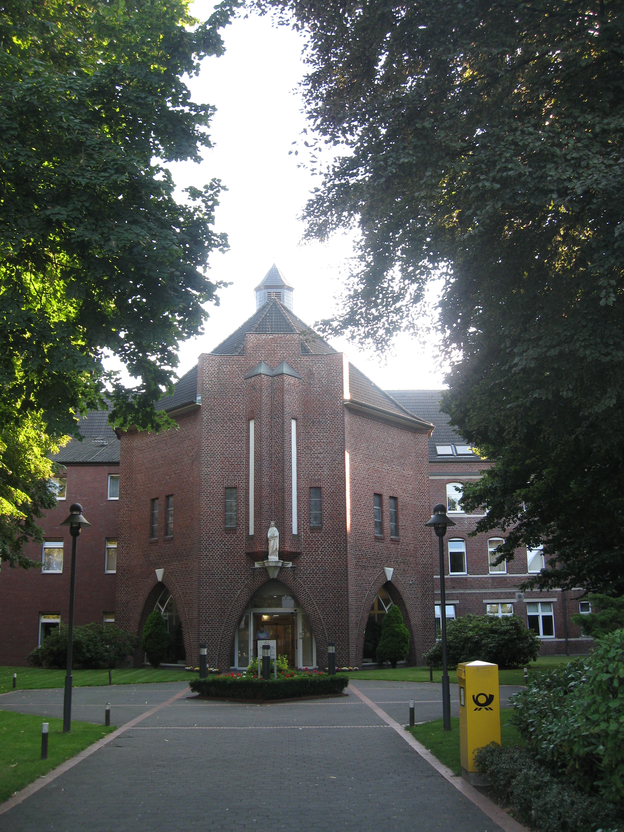 Elisabeth-Krankenhaus in Gelsenkirchen-Erle (Cranger Straße 226)